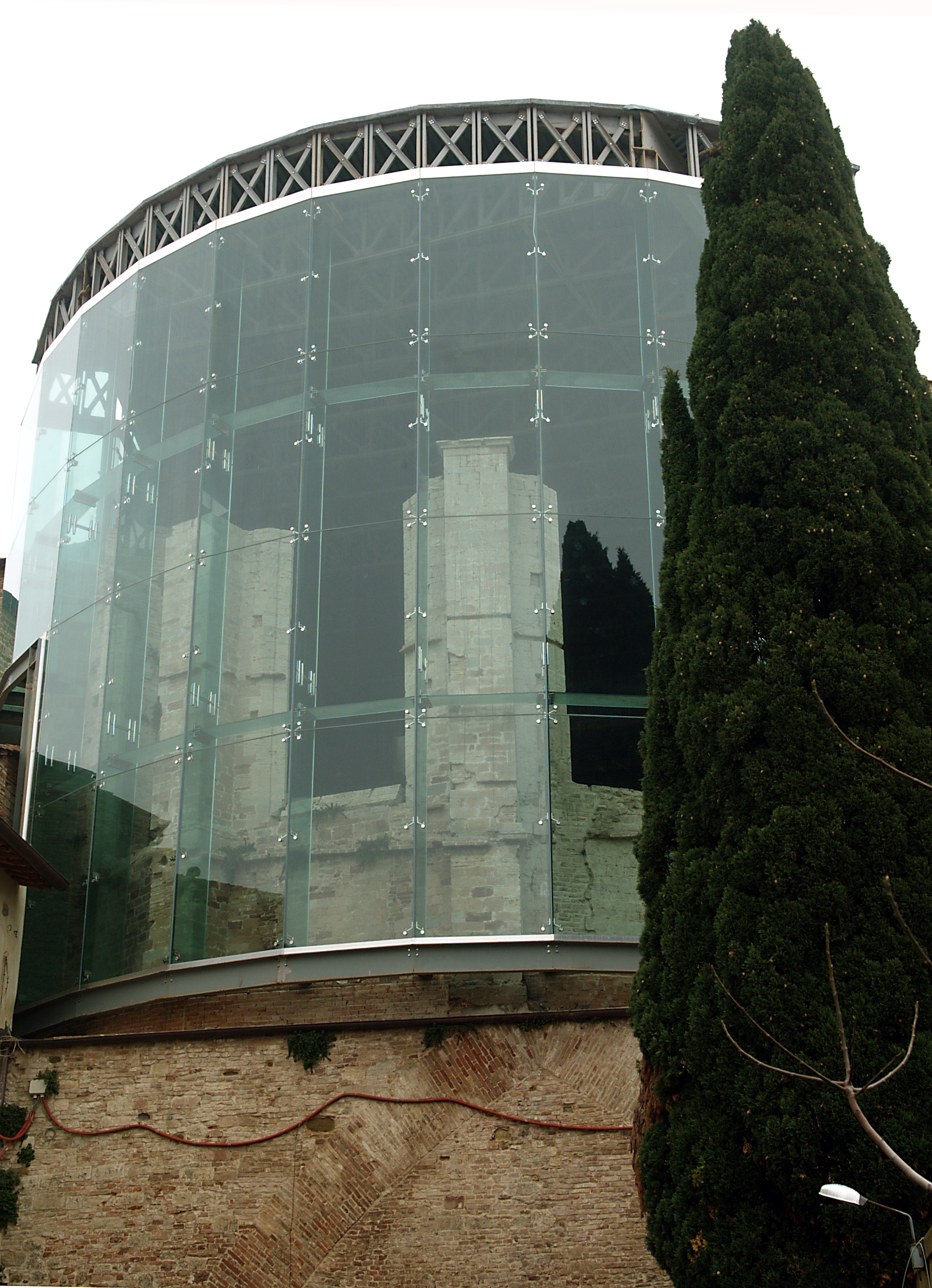 Complesso di San Francesco al Prato La foto ritrae la vetrata che circonda l'abside dell'ex Chiesa di San Francesco al prato ora nuovo auditorium realizzata a seguito dei recenti restauri. This is a photo of a monument which is part of cultural heritage of Italy.